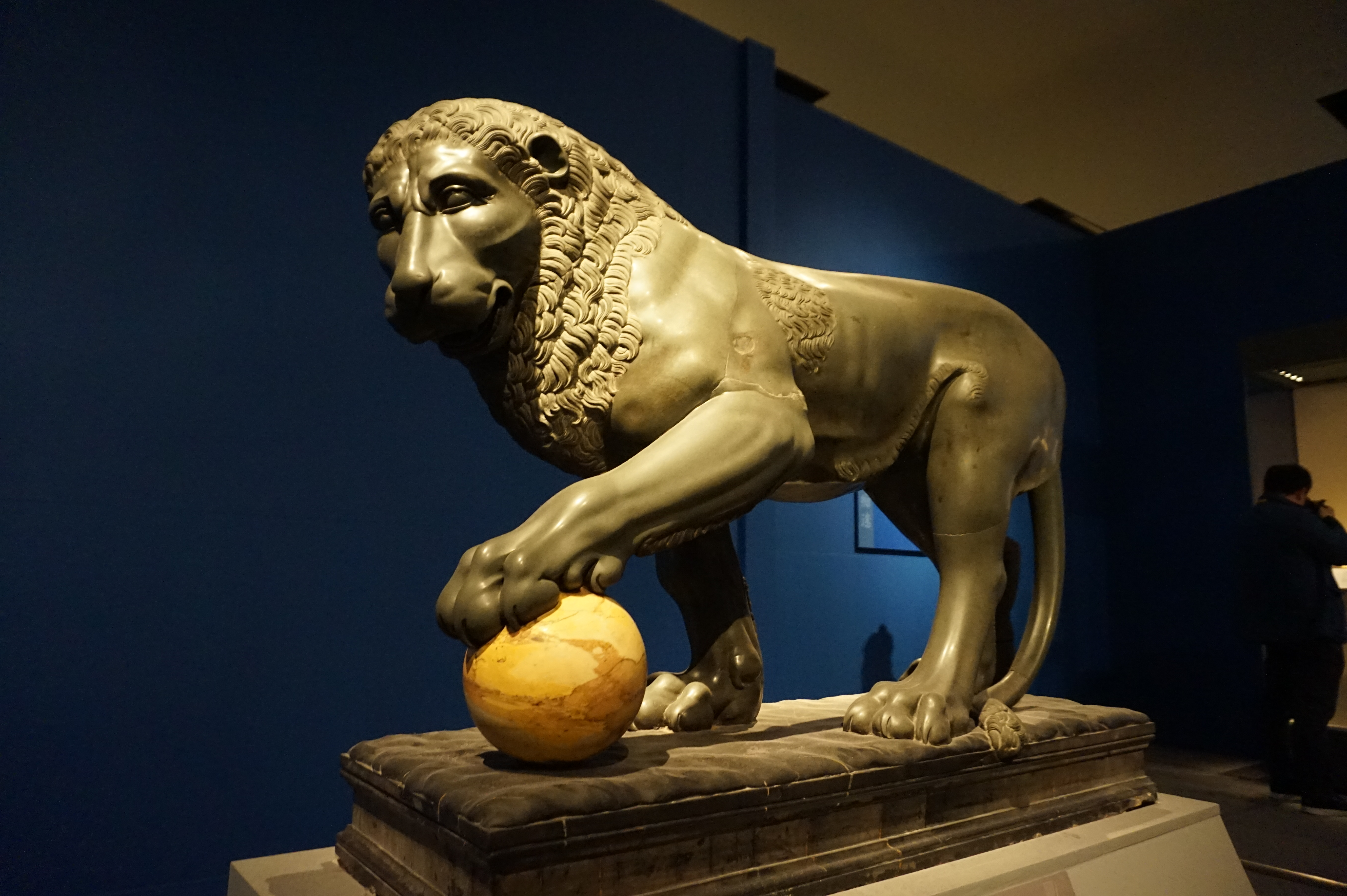 大理石雕塑：狮子。 公元1世纪，碧玄岩和黄色大理石。18世纪在意大利发现，阿尔巴尼旧藏；1815年卢浮宫购入。 法国卢浮宫博物馆希腊、伊特鲁里亚及罗马文物部藏。（LL30, Ma 1355）